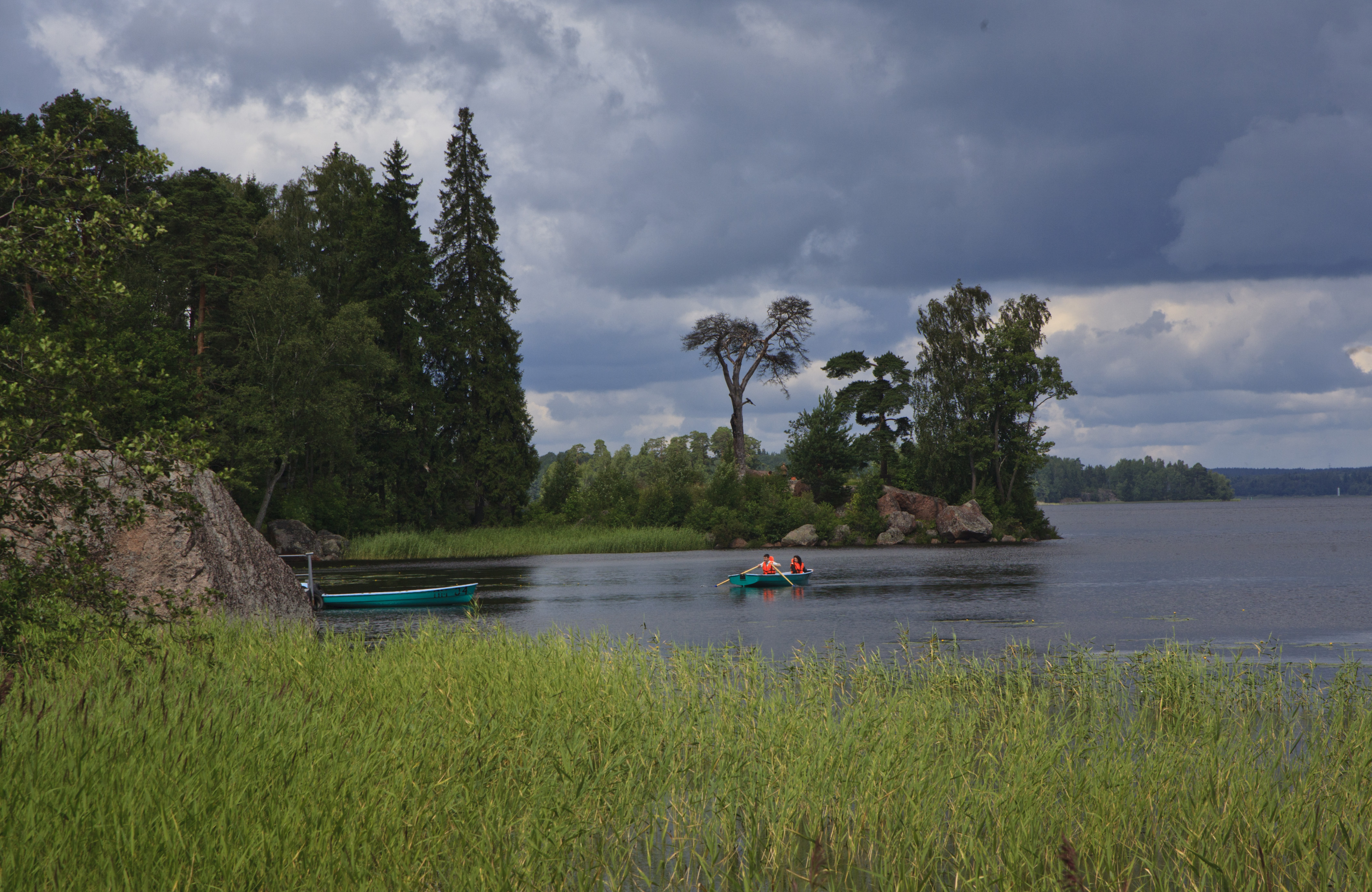 Парк Монрепо: в северной части города на берегу бухты Защитной Выборгского залива, Выборг, Выборгский район, Ленинградская область This image is related to the protected area of Russia number 4710069